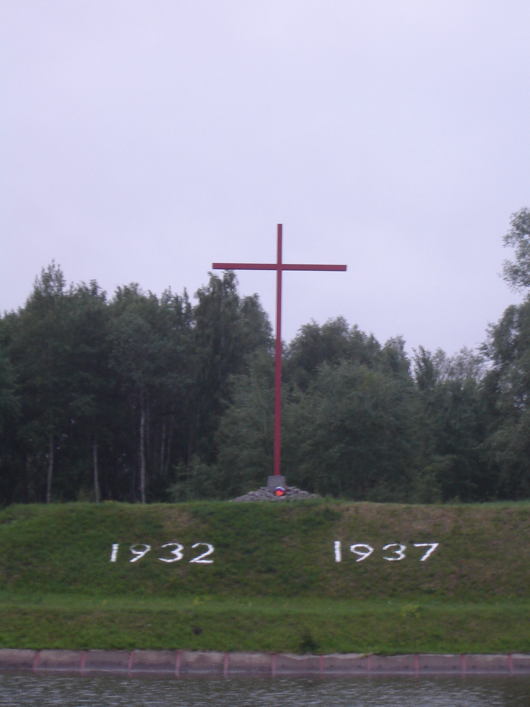 Памятник всем заключенным, построивших канал Волга - Москва с 1932 по 1937 год при въезде в город Дмитров. В т.ч. множеству погибших от непосильного труда и условий содержания, которых хоронили прямо на берегах канала. Памятник установлен 17 июля 1997 г. в связи с 60-ти летием канала.